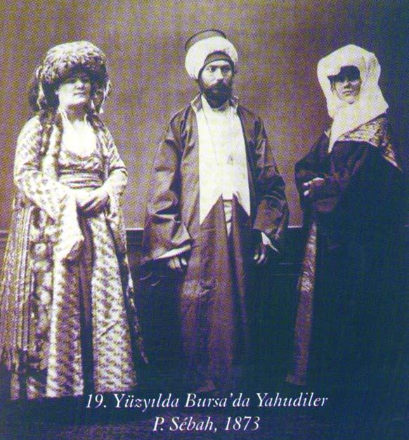 Bursa Yahudileri